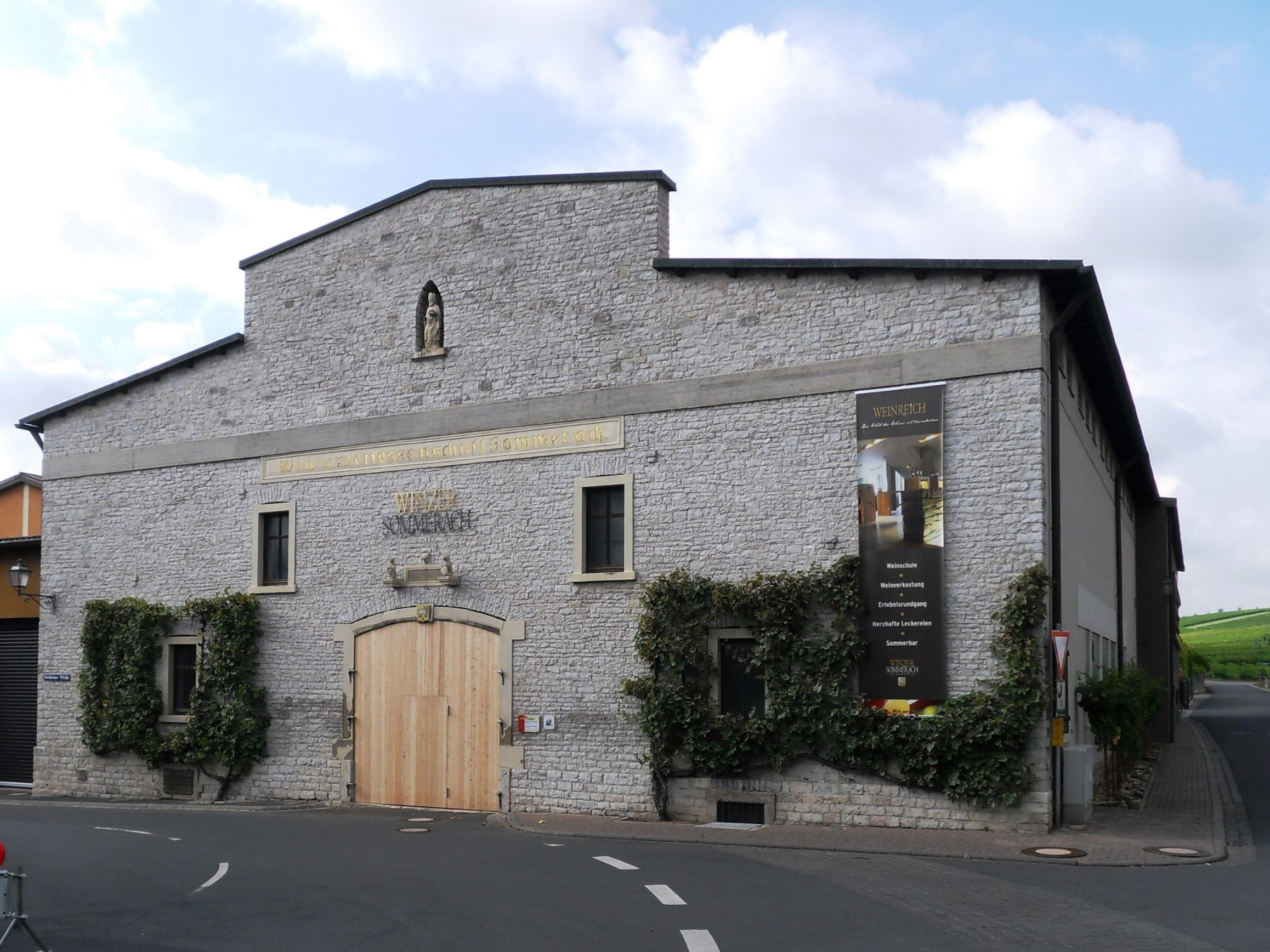 Südostgiebel des historischen Genossenschaftsgebäudes des Winzerkellers Sommerach, Zum Katzenkopf 1, Sommerach/Main